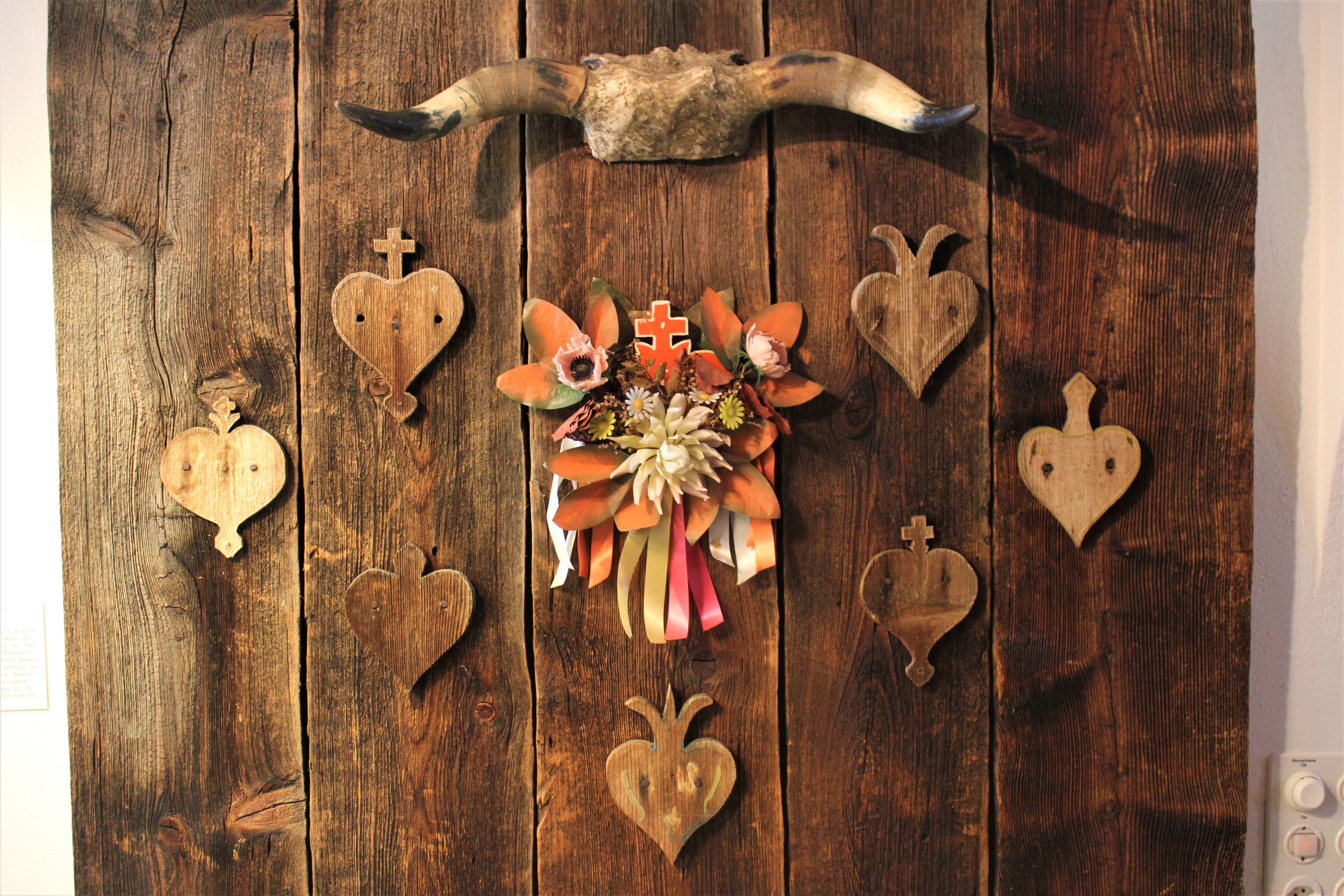 Nach altem Brauch werden die besten Milchkühe für die Alpabfahrt an der Stirn mit Blumen, Stoffbändern und einem Holzherz ("Häärzli") geziert. Die Holzherzen befestigt der Besitzer daheim an der Stallaussenwand. Bis zu Beginn des 20. Jh. fertigten die Alphirten die Holzherzen an.